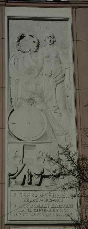 Darstellung der Semmeringbahn am Eisenbahnerheim